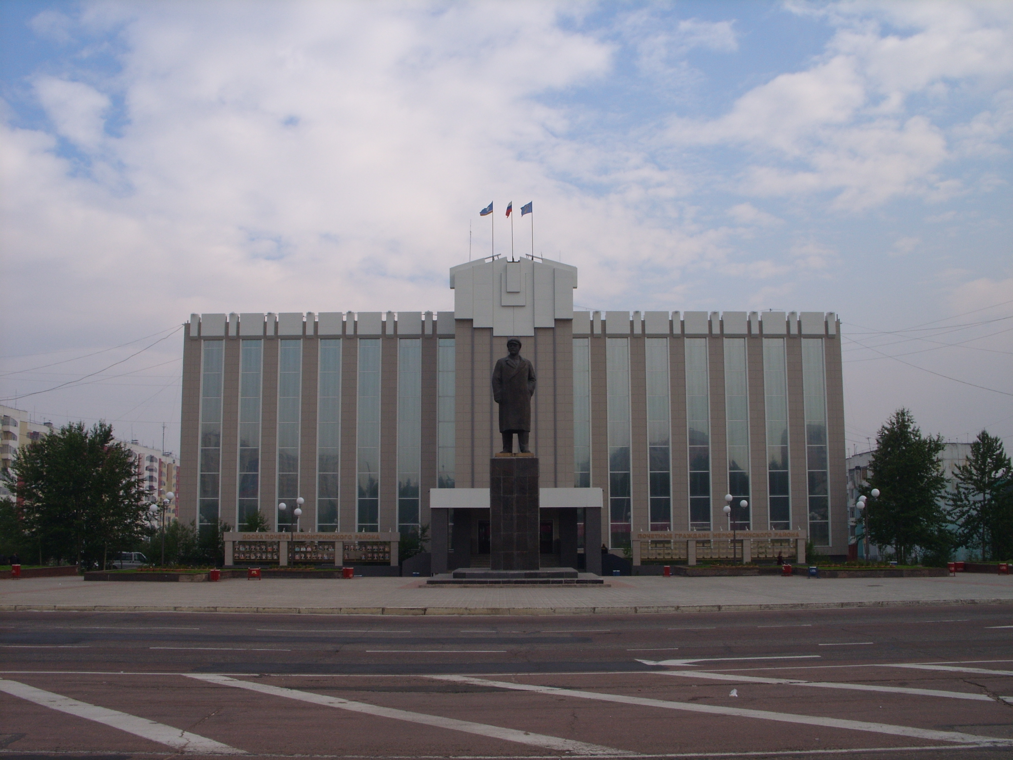 снимки июля 2008 г.